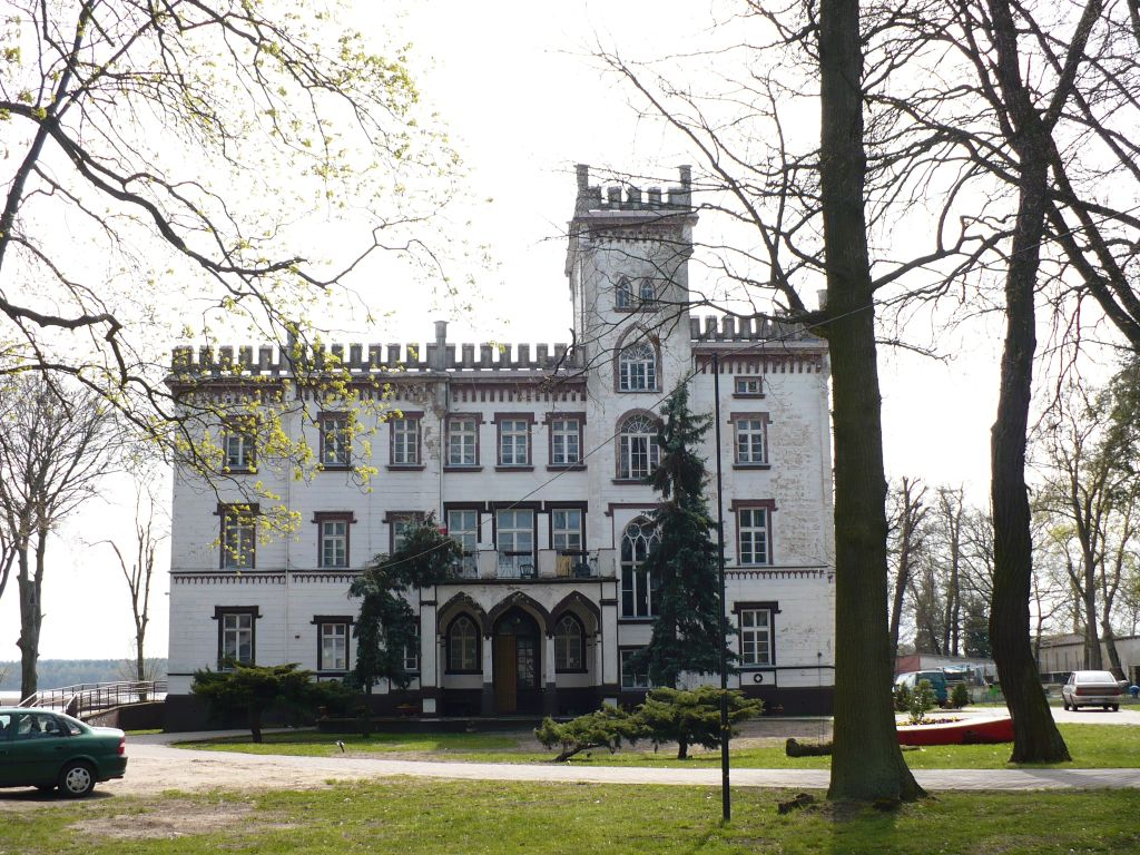 Pałac w Przełazach od strony parku